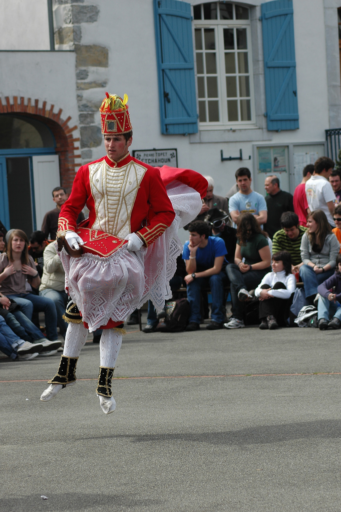 Larraineko maskarada Barkoxen. 2010-03-27